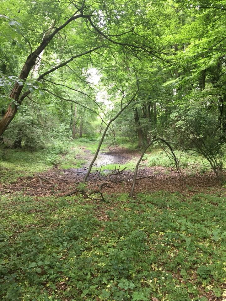 Forma jest wypłycona, głębokość wody sięga kilku centymetrów, widoczny jest brak roślinności wodnej, co sugeruje, że pomimo stagnowania niewielkiej ilości wody, forma widoczna na zdjęciu to paleomeander we wczesnej fazie rozwoju. Obecność wody jest powiązana z wysokimi opadami i specyfiką środowiska.